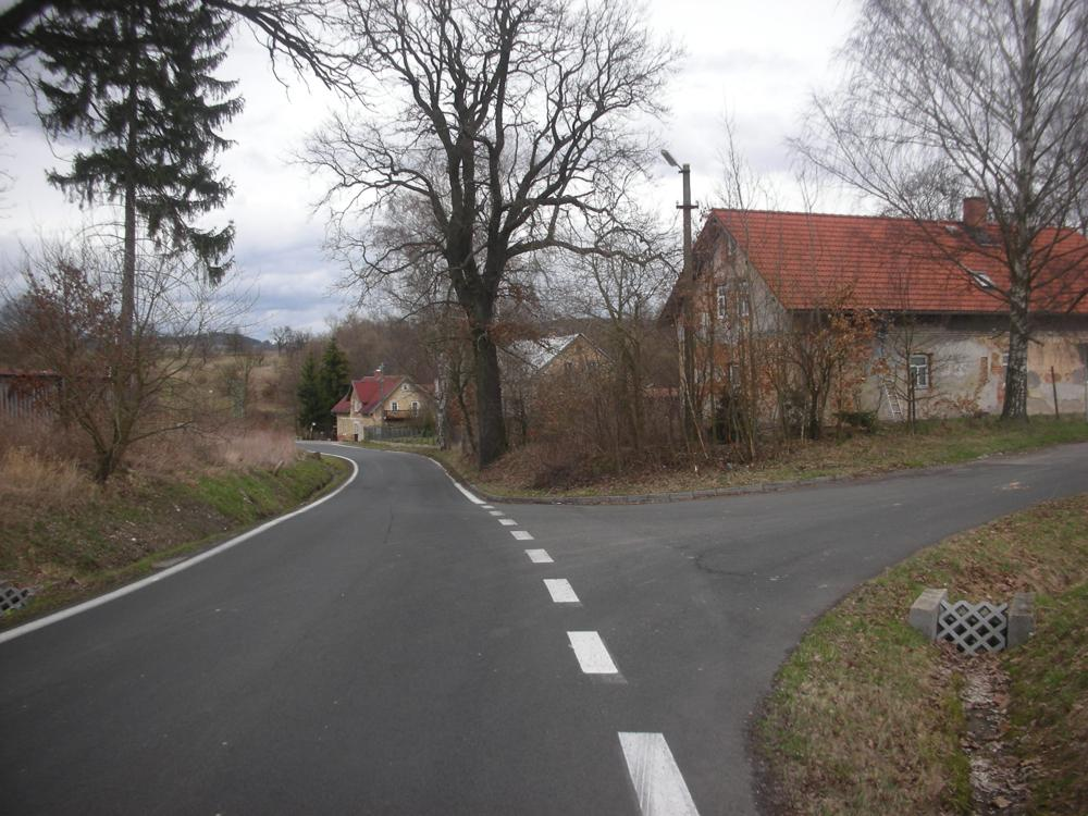 Durchgangsstrasse in Hrzin, Ortsteil von Nový Kostel